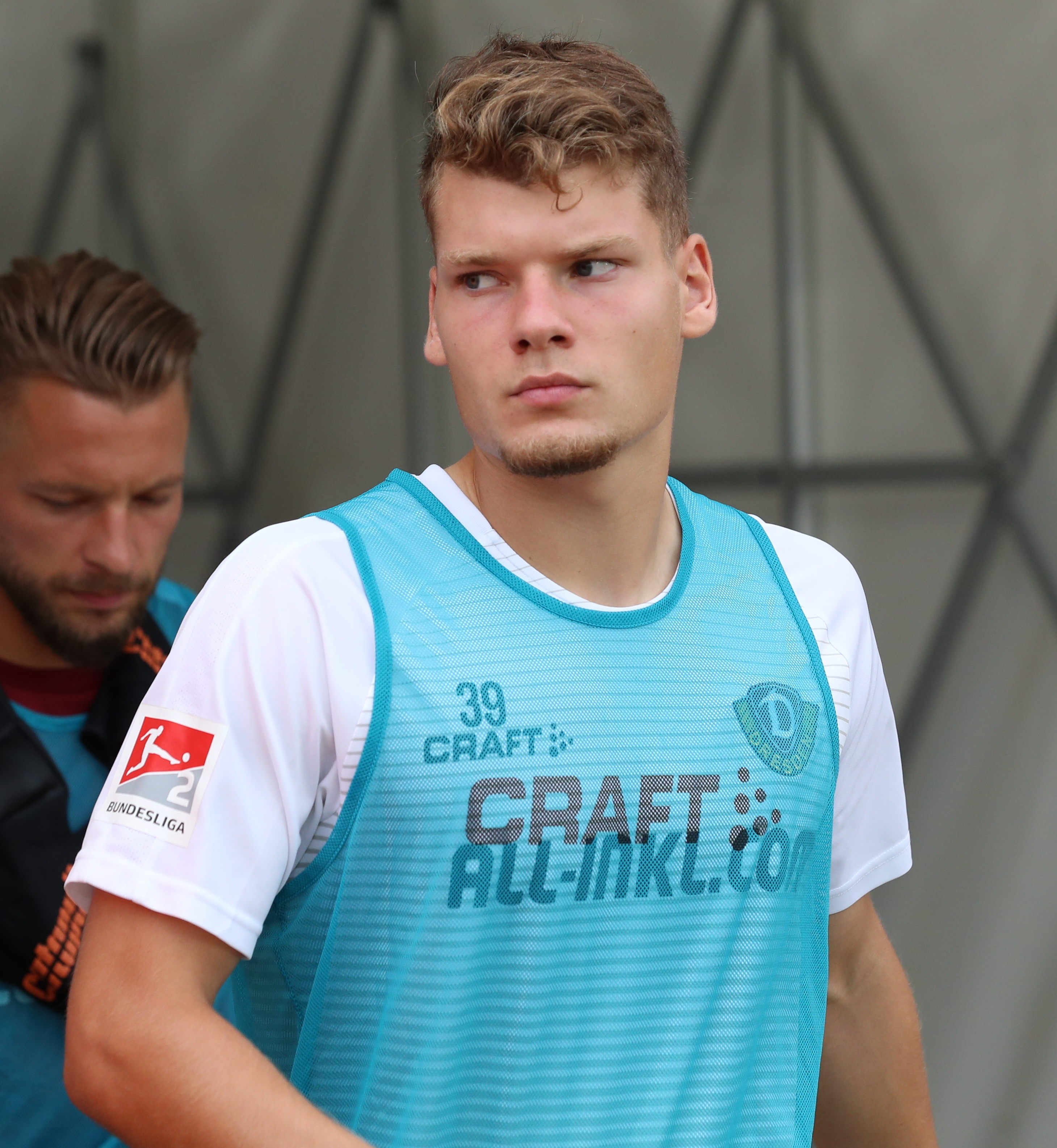 DFB-Pokal 2019/20, 1. Hauptrunde, TuS Dassendorf gegen SG Dynamo Dresden 0:3 (0:1)